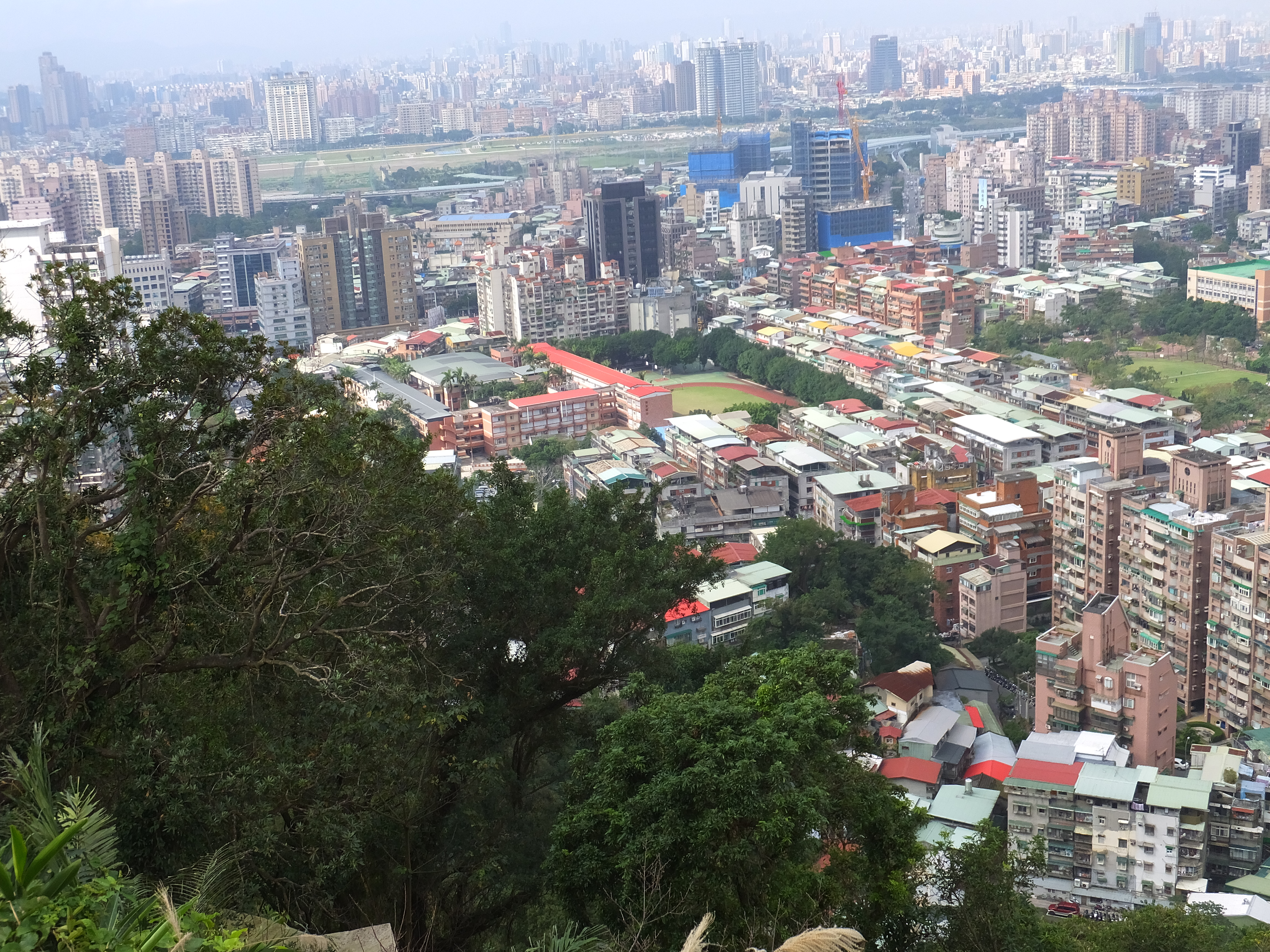 景美 Jingmei